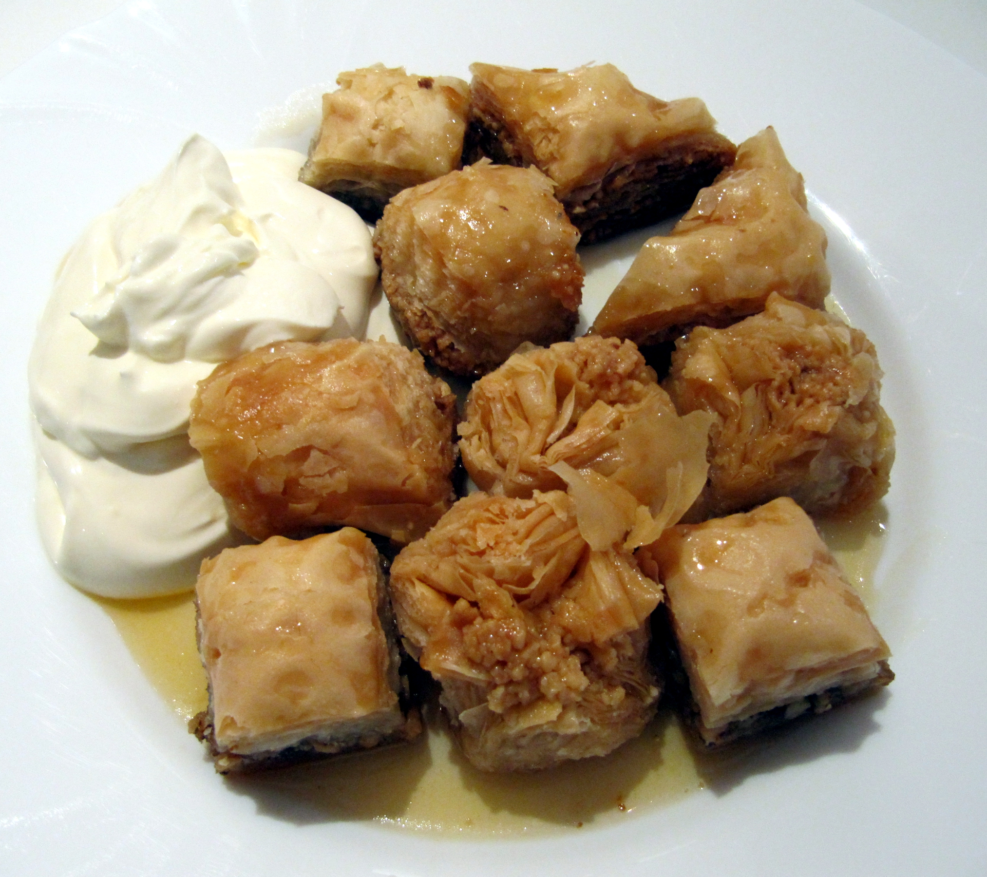 Baklava_ALDI-Nord_02